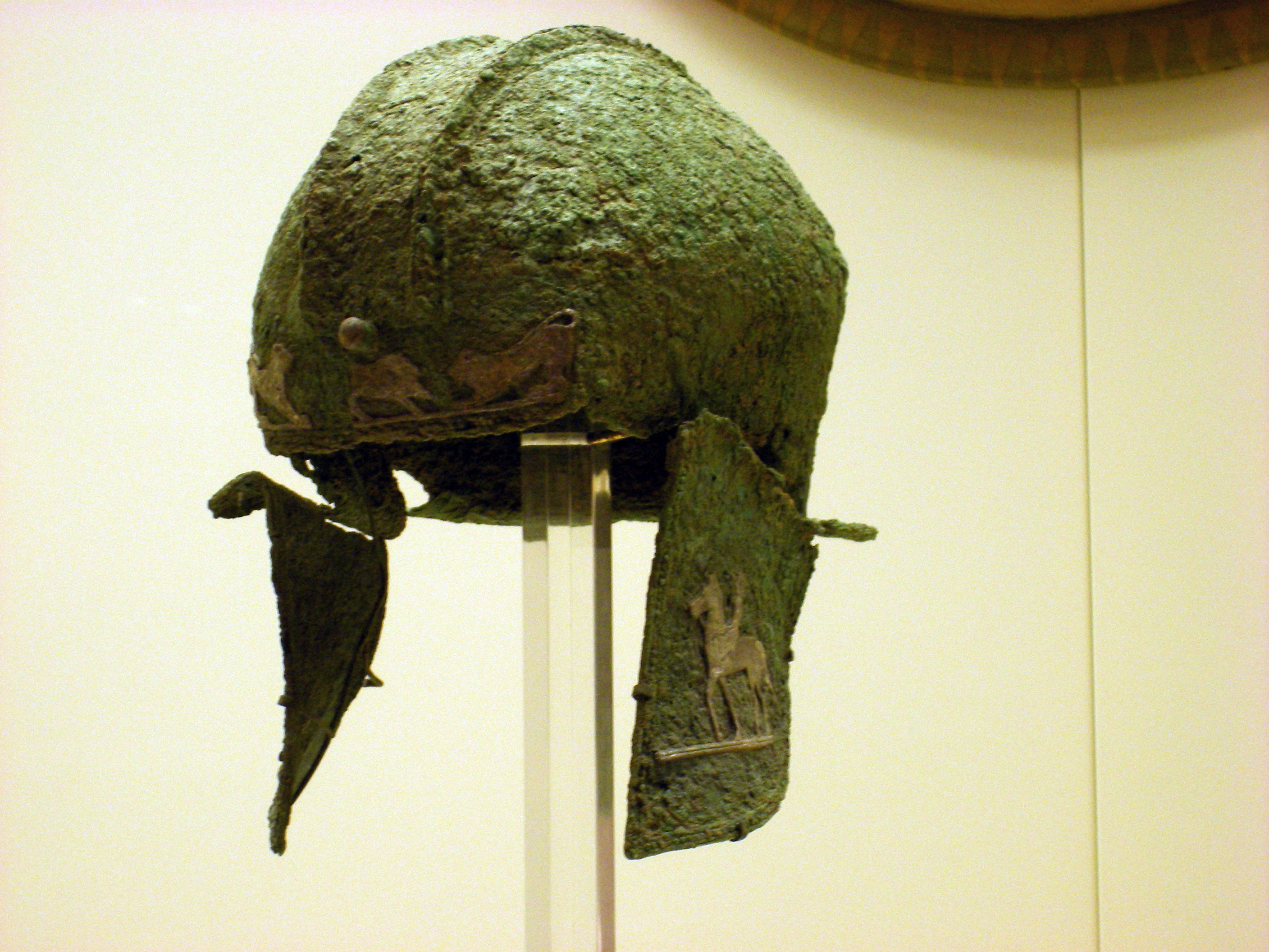 Casque de type «illyrien» avec un décor appliqué en feuille d'argent. 530 avant J.C